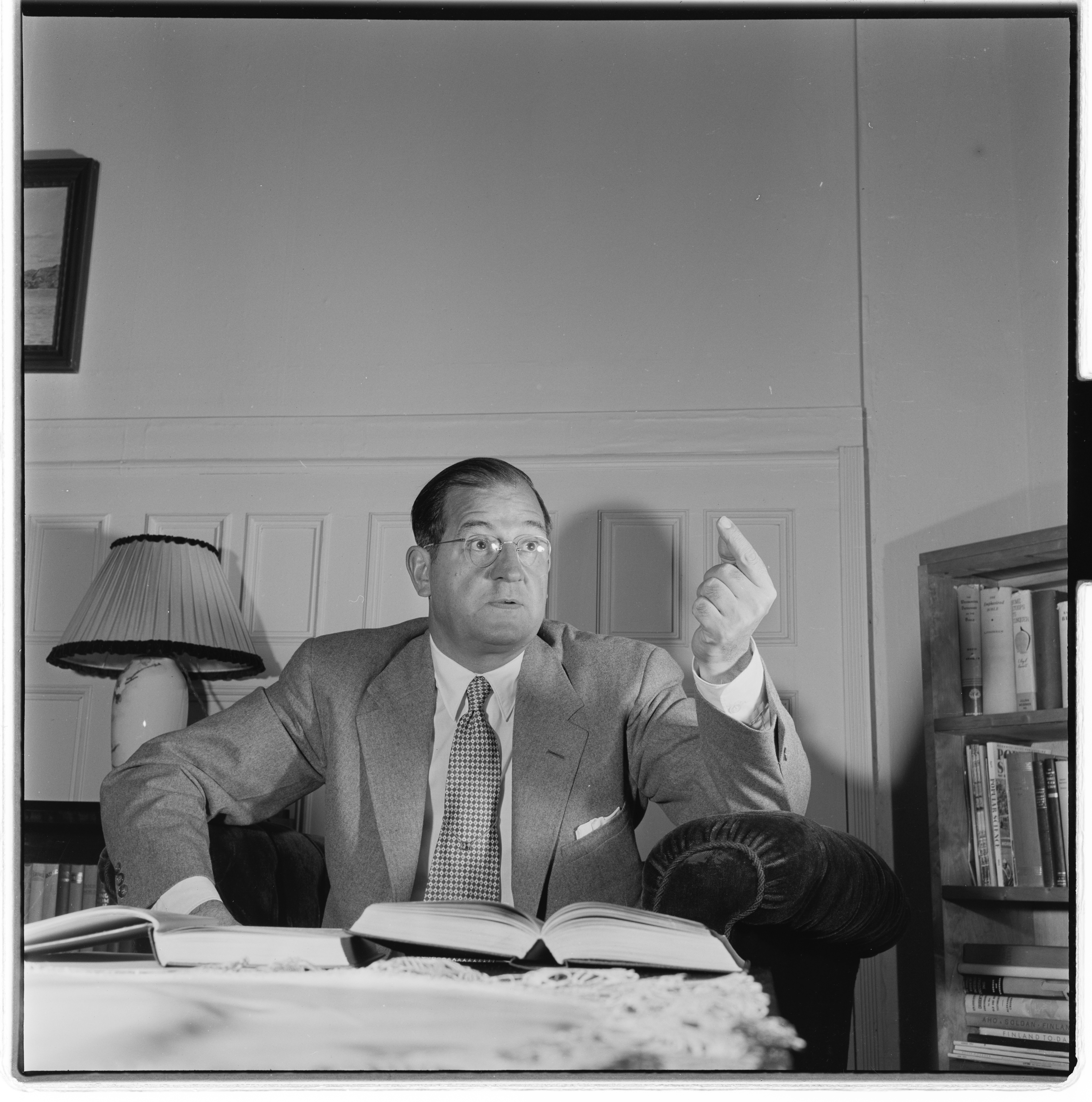 Bildet er hentet fra Arkivverket. Nathan Knorr, Jehovas vitne.NÅ nr. 38,1955 Arkivinstitusjon : Riksarkivet Arkivnavn : Billedbladet NÅ Sted : Norge, Ukjent, Ukjent, Emneord: portrett, mann, Jehovas vitner Avbildet: Knorr, Nathan Homer